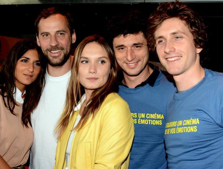 Géraldine Nakache, Fred Testot, Ana Girardot, Jérémie Elkaïm et Baptiste Lecaplain à l'ouverture de la Fête du cinéma, au complexe cinématographique UGC Ciné Cité Bercy de Paris.